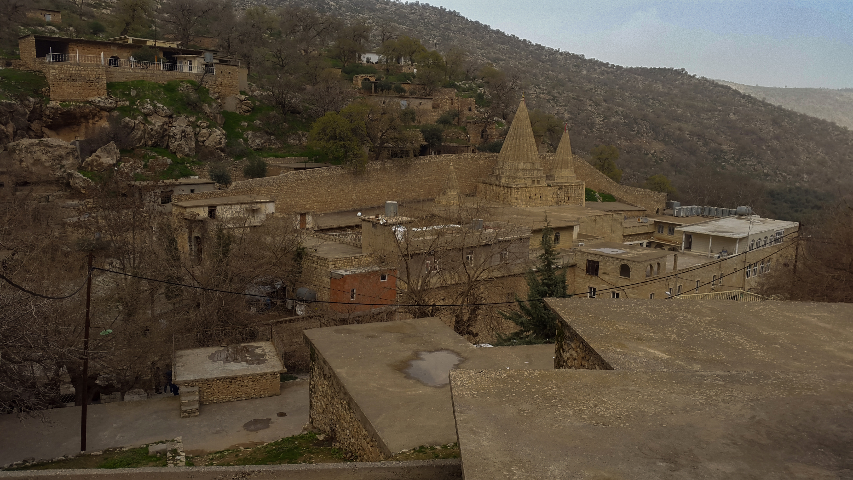 Panorama sulla città sacra di Lalish.